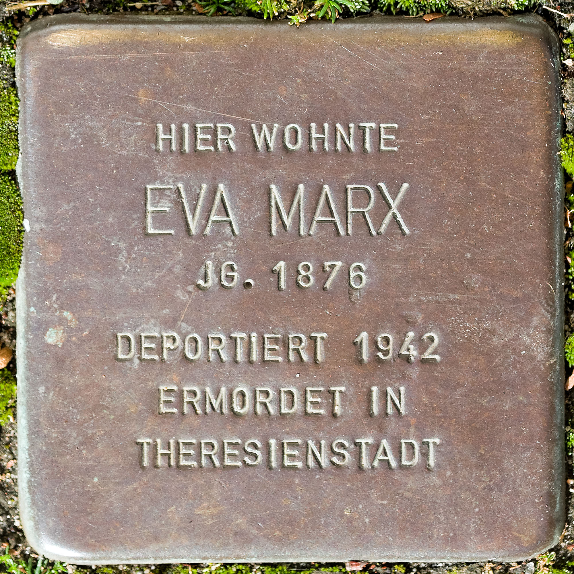 Stolpersteine in Viersen: Marx, Eva